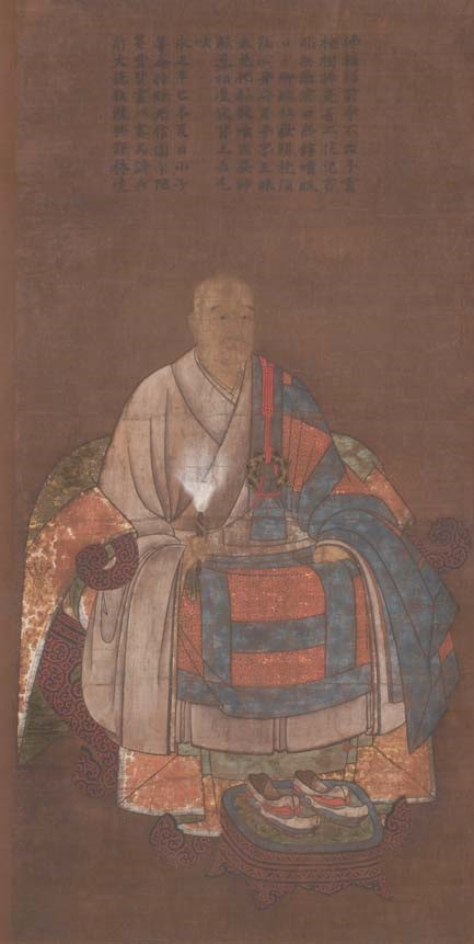 大徳寺68世、妙心寺17世・山名豊久(鄧林宗棟)の肖像画。